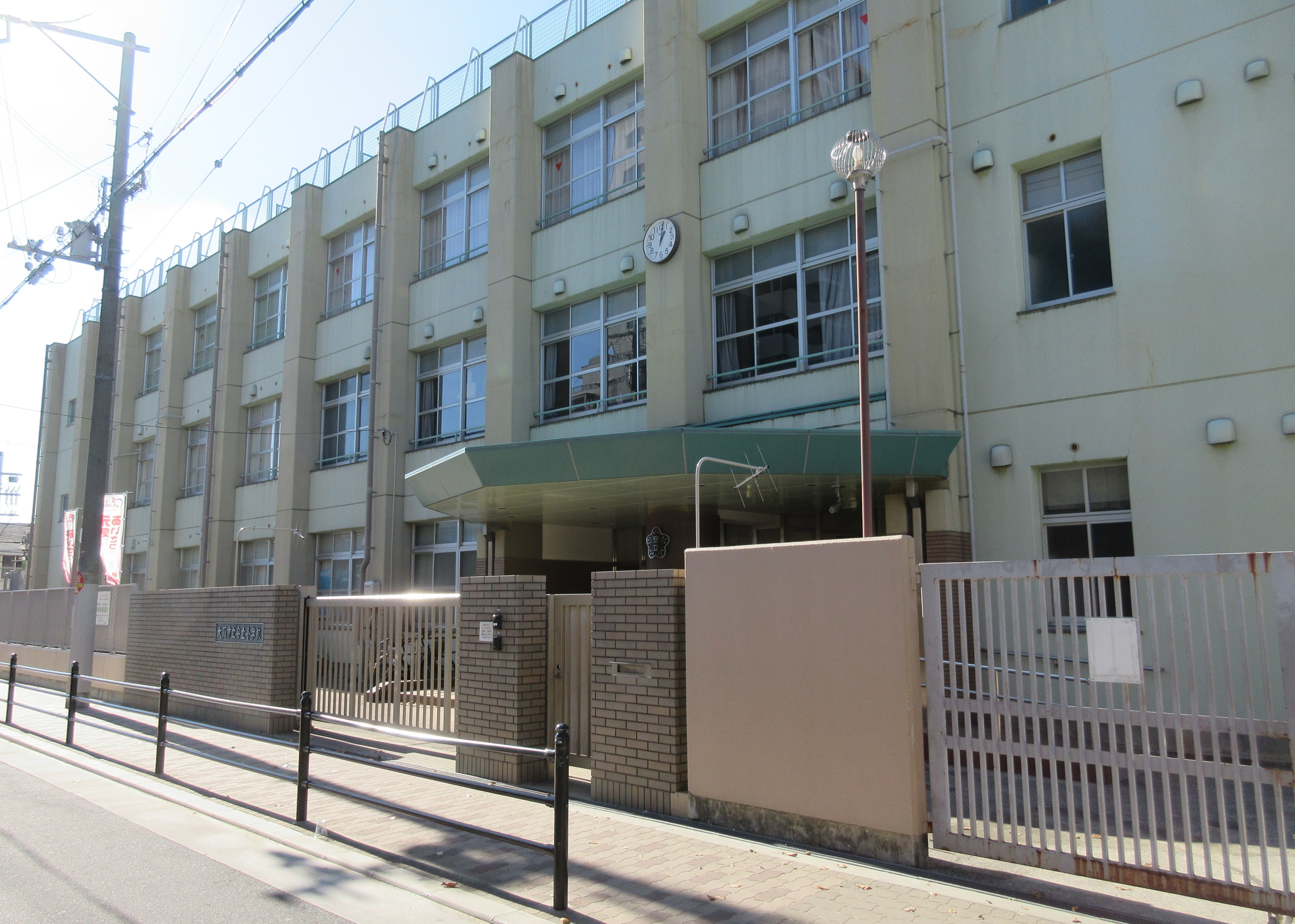 大阪市立安立小学校